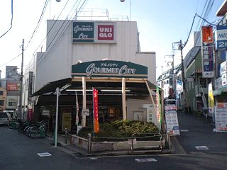 ダイエーグルメシティ下北沢店 閉店前